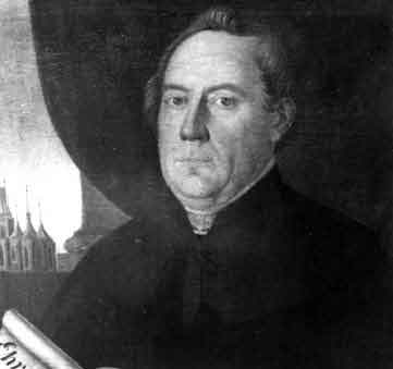 Kněz Antonín Pankrác, katecheta při lounské hlavní škole a v letech 1807 - 1859 lounský děkan. 25. dubna 1841 prohlášen prvním čestným občanem města Loun.